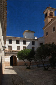 Patio externo anterior a la entrada de la iglesia y del convento.